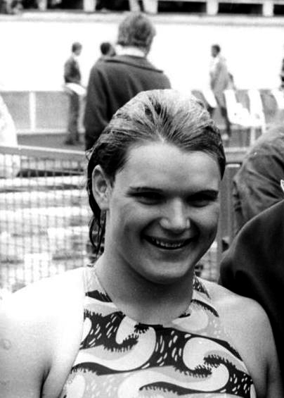 ADN-ZB 04.07.78 Berlin: 29. DDR- Meisterschaften im Sportschwimmen- Sie sorgten für die ersten Paukenschläge der diesjährigen Titelkämpfe: Andrea Pollack (1.) mit ihrem neuen Weltrekord über 100 m Schmetterling (59,46 s ) am 3.7. und Babara Krause (r.-beide SC Dynamo Berlin) am Vortag mit der neuen Weltrekordzeit über 200 m Freistil (1:59,04).